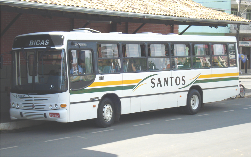 Ônibus urbano da empresa Viação Santos, número de ordem 801, na linha intermunicipal prefixo 3064 (Bicas / Guarará / Bicas).